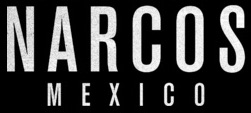 logo de la série Narcos: Mexico